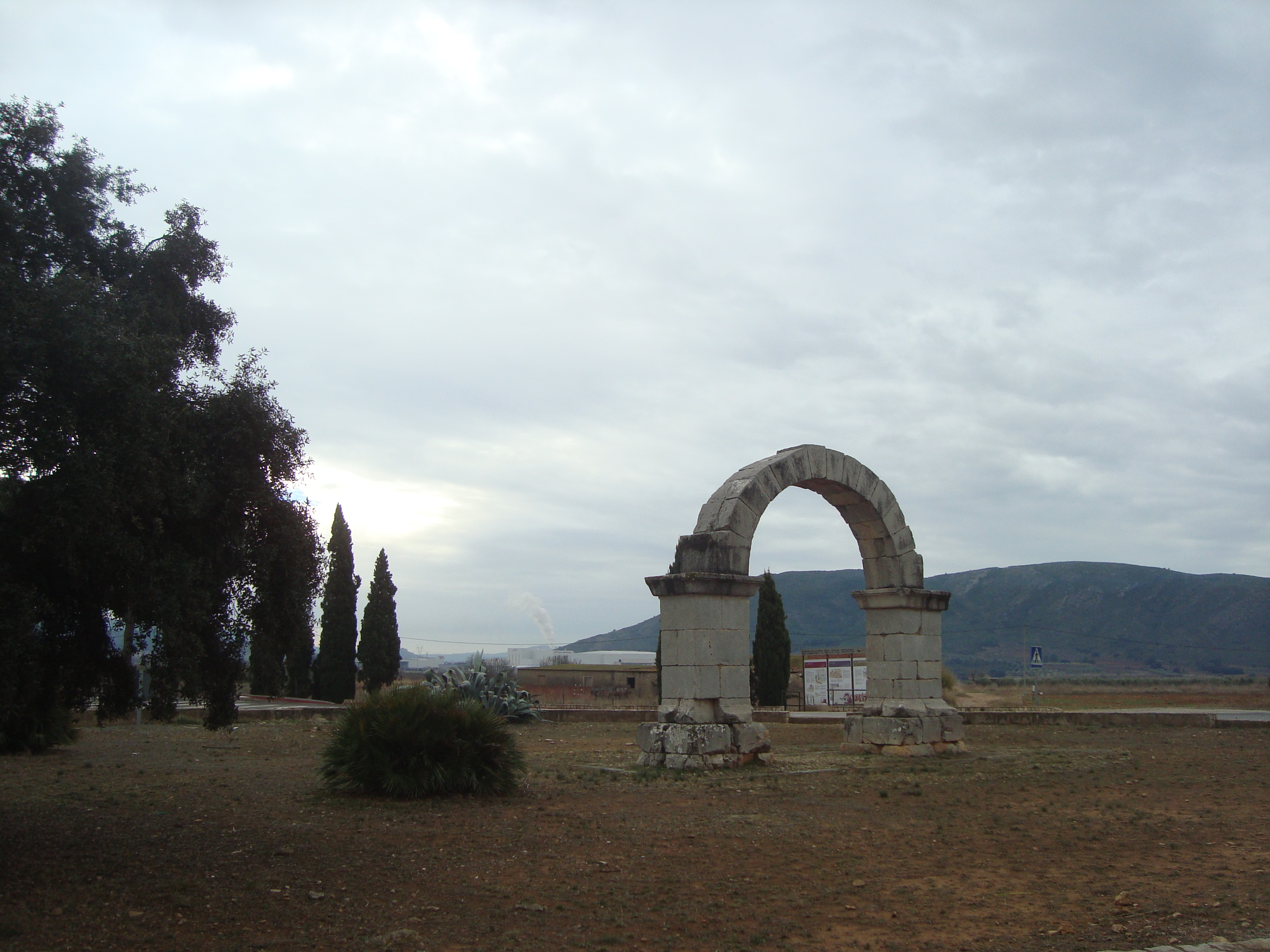 Arc romà de Cabanes, Comunitat Valenciana